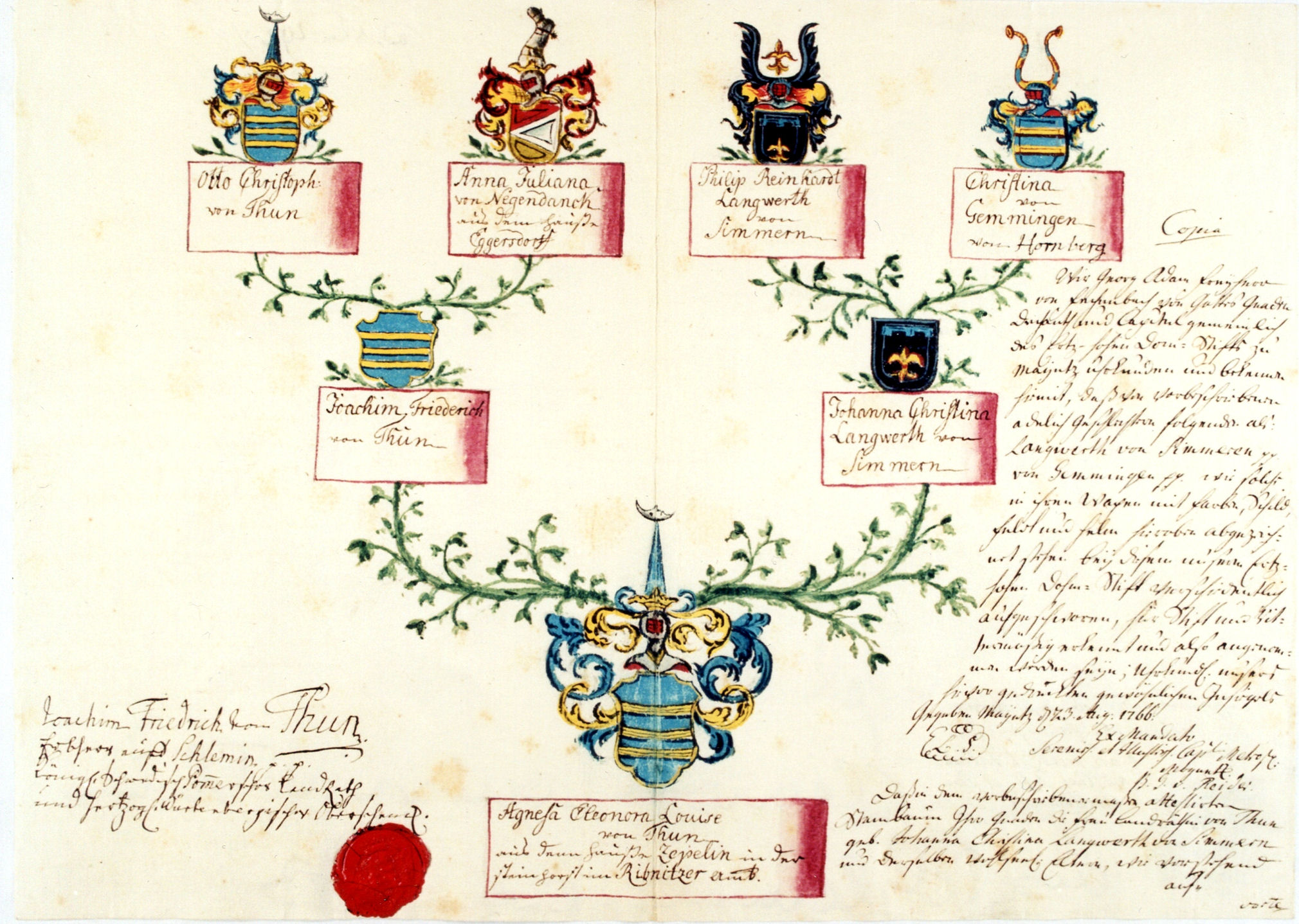 Ahnentafel 1766 Agnesa Eleonora Louisa von Thun, eingereicht beim Kloster Dobbertin